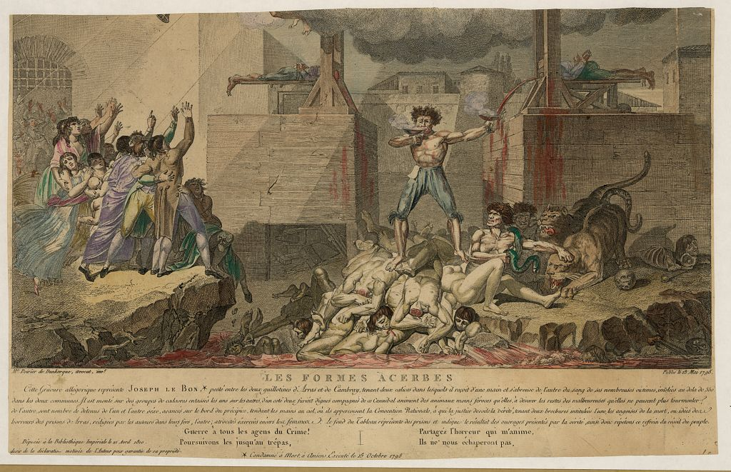 "Les formes acerbes". Library of Congress description: "Print shows Joseph Le Bon, as a shirtless, crazed madman, standing on a pile of decapitated bodies between two guillotines, he is drinking blood from a chalice as he fills another chalice with the blood spewing from freshly decapited victim. Notice of his own execution appears at the bottom center of the print: Condamné à mort, à Amiens. Executé le 15 Octobre 1795." Caption (in French [modernized spelling]): "Cette gravure allégorique représente Joseph Le Bon*, posté entre les deux guillotines d'Arras et de Cambrai, tenant deux calices dans lesquels il reçoit d'une main et s'abreuve de l'autre du sang de ses nombreuses victimes, immolées au-delà de 550 dans les deux communes. Il est monté sur des groupes de cadavres entassés les uns sur les autres. D'un côté, deux furies, dignes compagnes de ce cannibale, animent des animaux moins féroces qu'elles, à dévorer les restes des malheureuses qu'elles ne peuvent plus tourmenter ; de l'autre, sont nombre de détenus de l'un et l'autre sexe, avancés sur le bord du précipice, tendant les mains au ciel, où ils aperçoivent la Convention Nationale, à qui la justice dévoile la vérité, tenant deux brochures intitulées, l'une, les angoisses de la mort, ou idées des horreurs des prisons d'Arras, rédigées par les auteurs dans leurs fers ; l'autre, atrocités exercées envers les femmes. Le fond du tableau représente des prisons et indique le résultat des ouvrages présentés par la vérité. Ainsi donc répétons ce refrain du réveil du peuple : Guerre à tous les agents du crime ! / Poursuivons-les jusqu'au trépas, / Partagez l'horreur qui m'anime, / Ils ne nous échapperont pas. *Condamné à mort à Amiens. Exécuté le 15 octobre 1795."